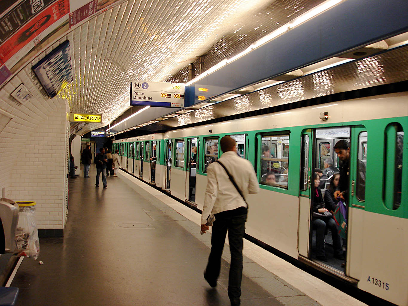 Station Place de Clichy de la ligne 2 du métro de Paris, France.